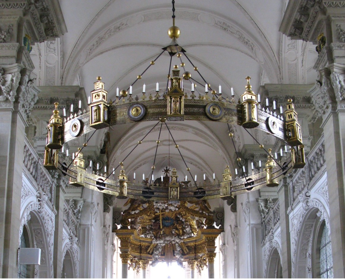 Hartwigleuchter, ca. 1130, Radleuchter Kloster Comburg bei Schwäbisch Hall